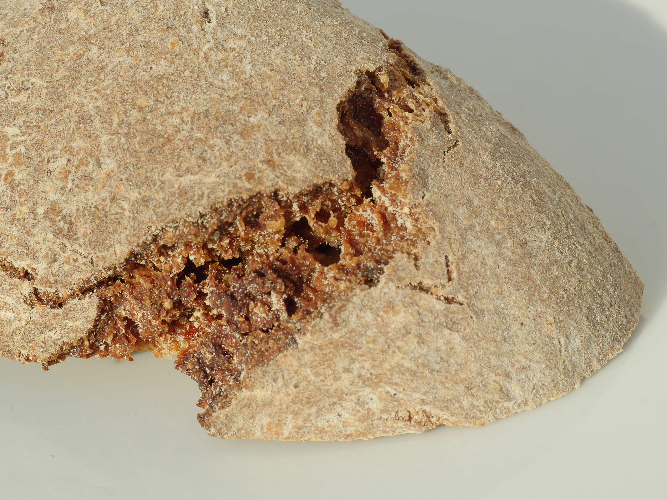 Endstück eines Roggenvollkornbrots mit Ausbund in der Kruste.